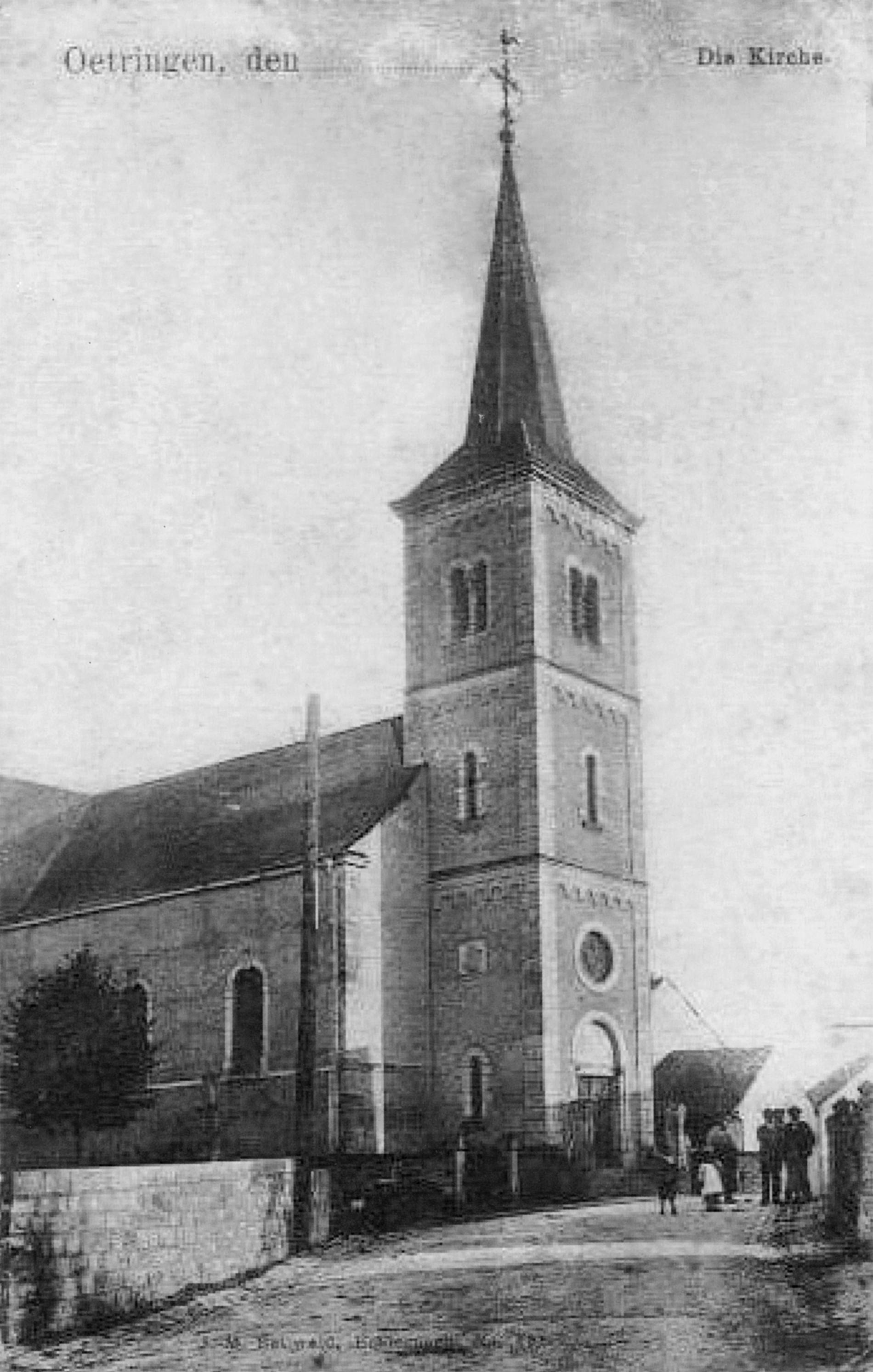 Kierch vun Éiter ëm 1900, Foto vum J.M. Bellwald, N° 751